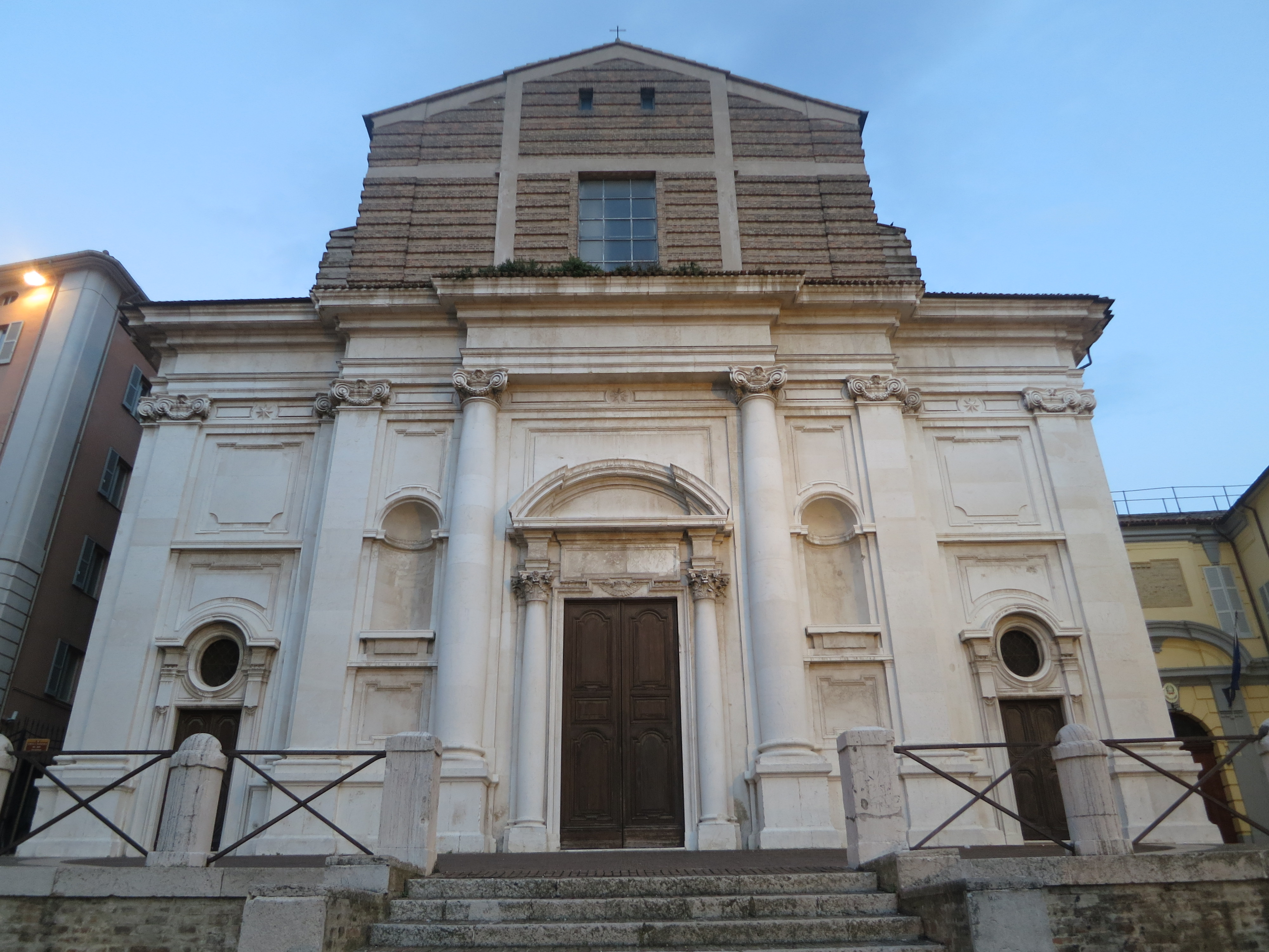 Chiesa di San Domenico This is a photo of a monument which is part of cultural heritage of Italy.